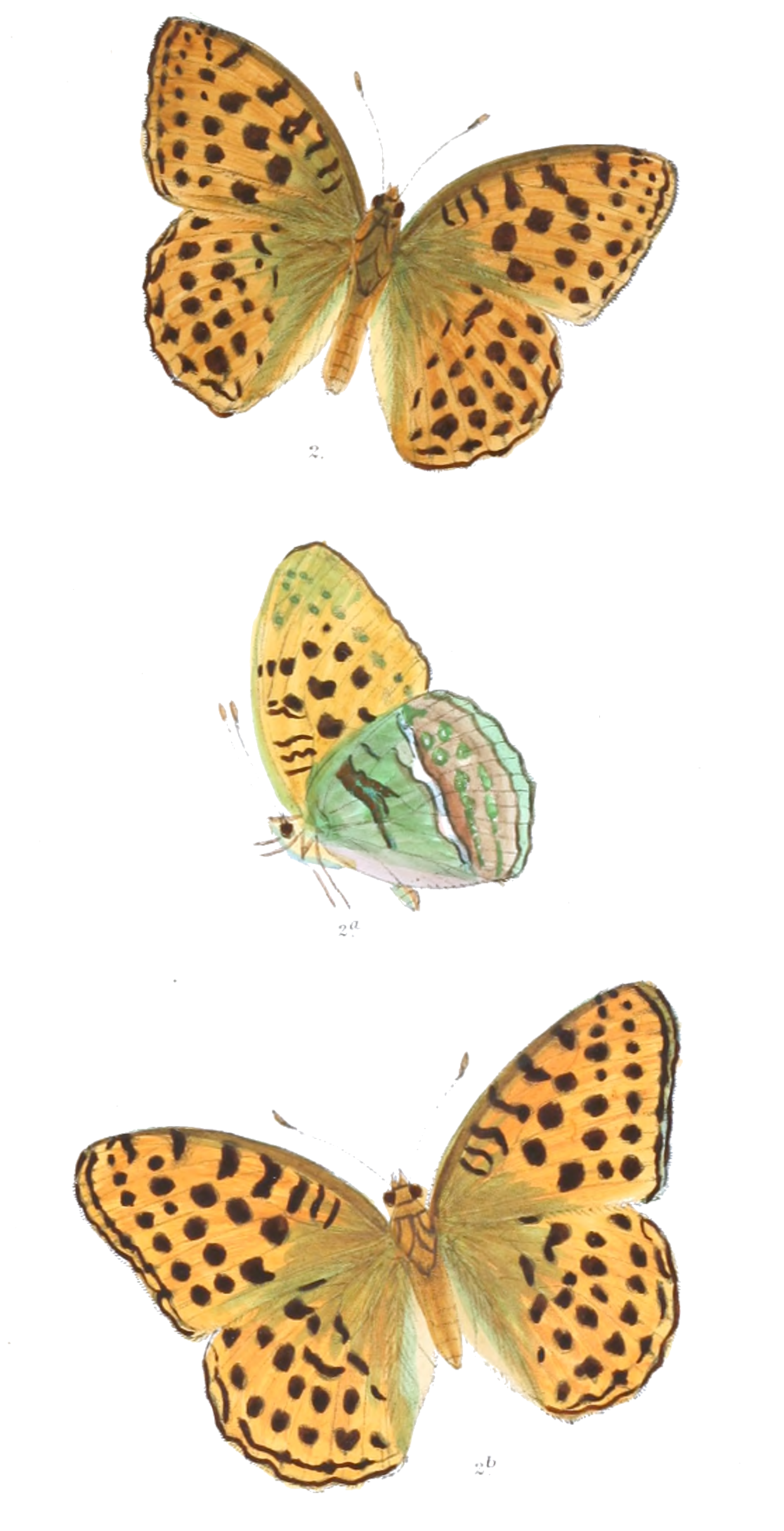 Dryas rudra = Argynnis laodice rudra